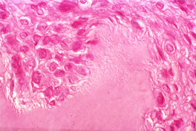 TLp-Verband